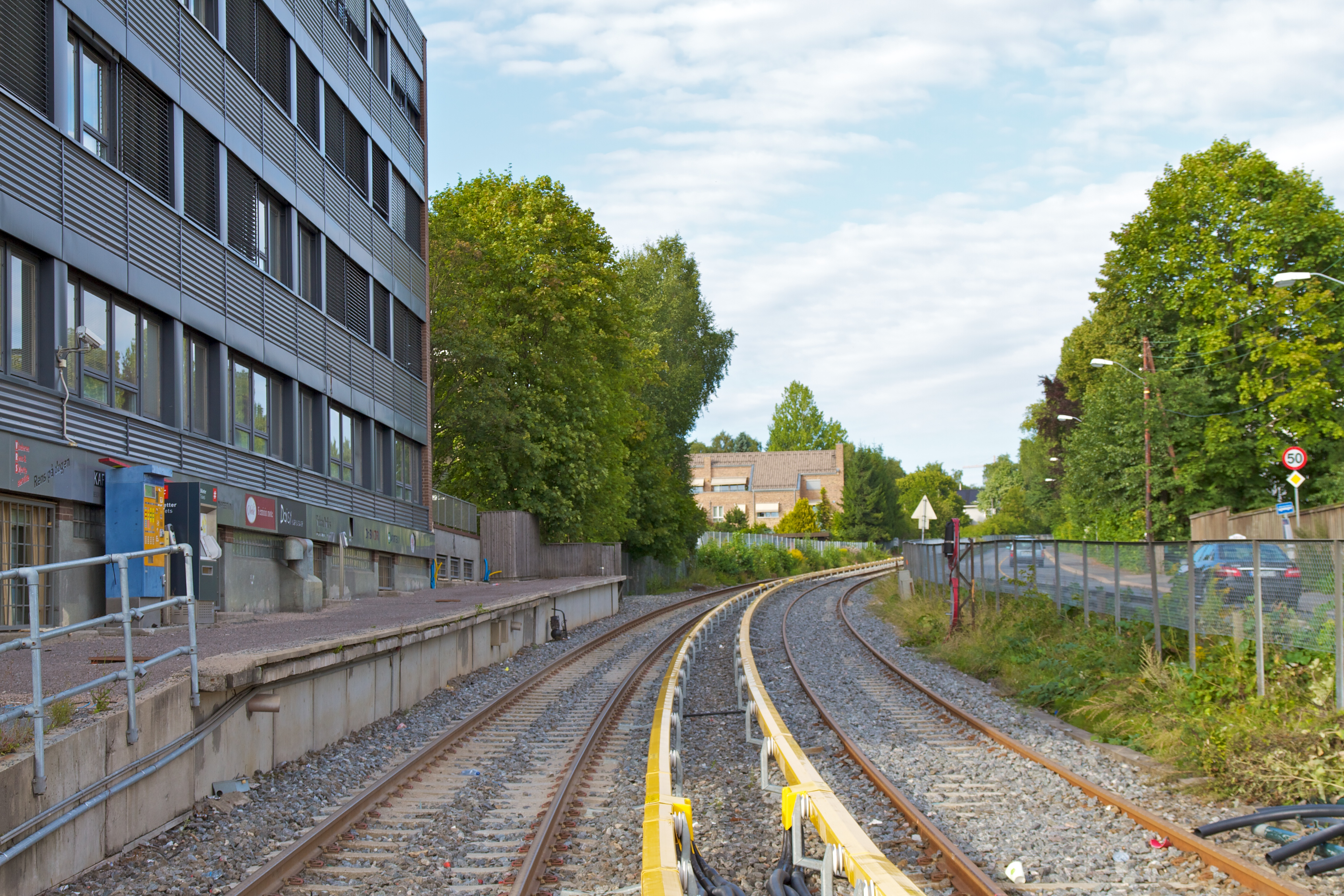 Vinderen stasjon på Holmenkollbanen.